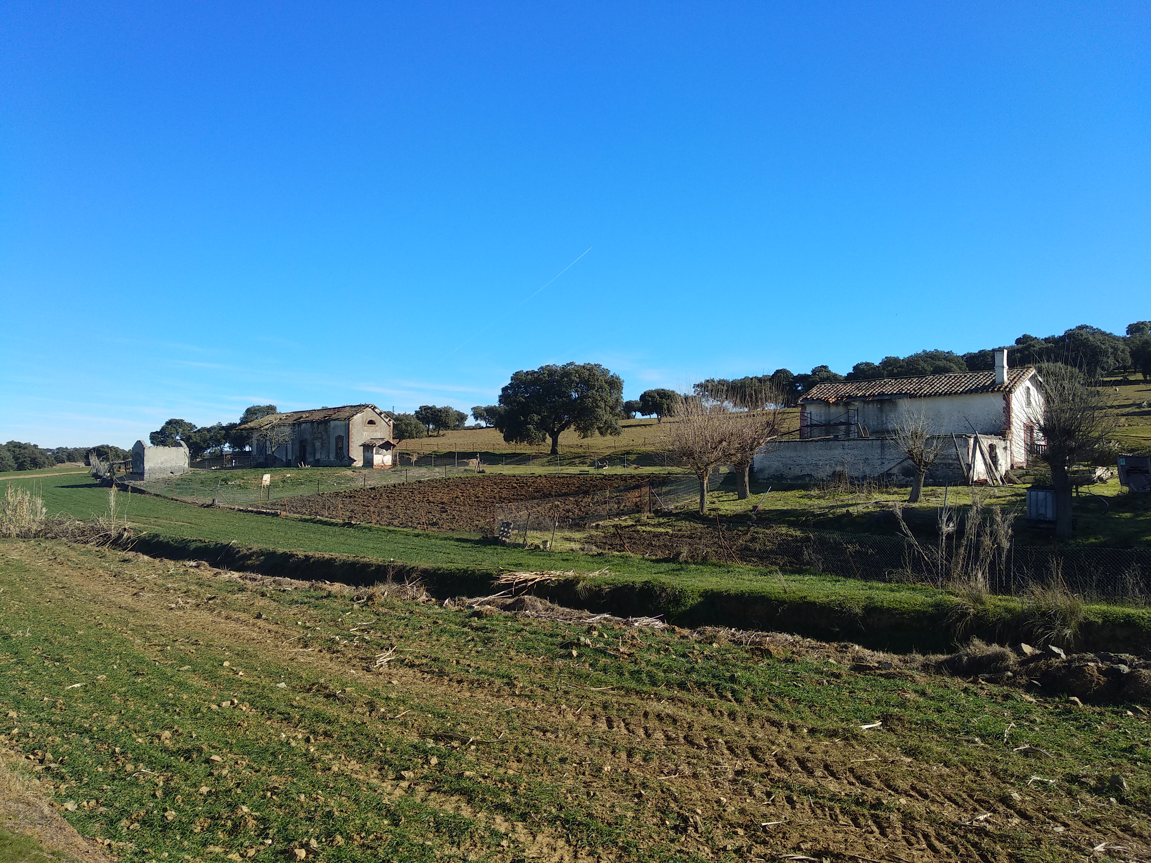 Antigua estación de la Coronada-Argallón en el municipio de Fuente Obejuna (Córdoba, España). En primer plano, casilla ferroviaria y al fondo, edificio de viajeros.